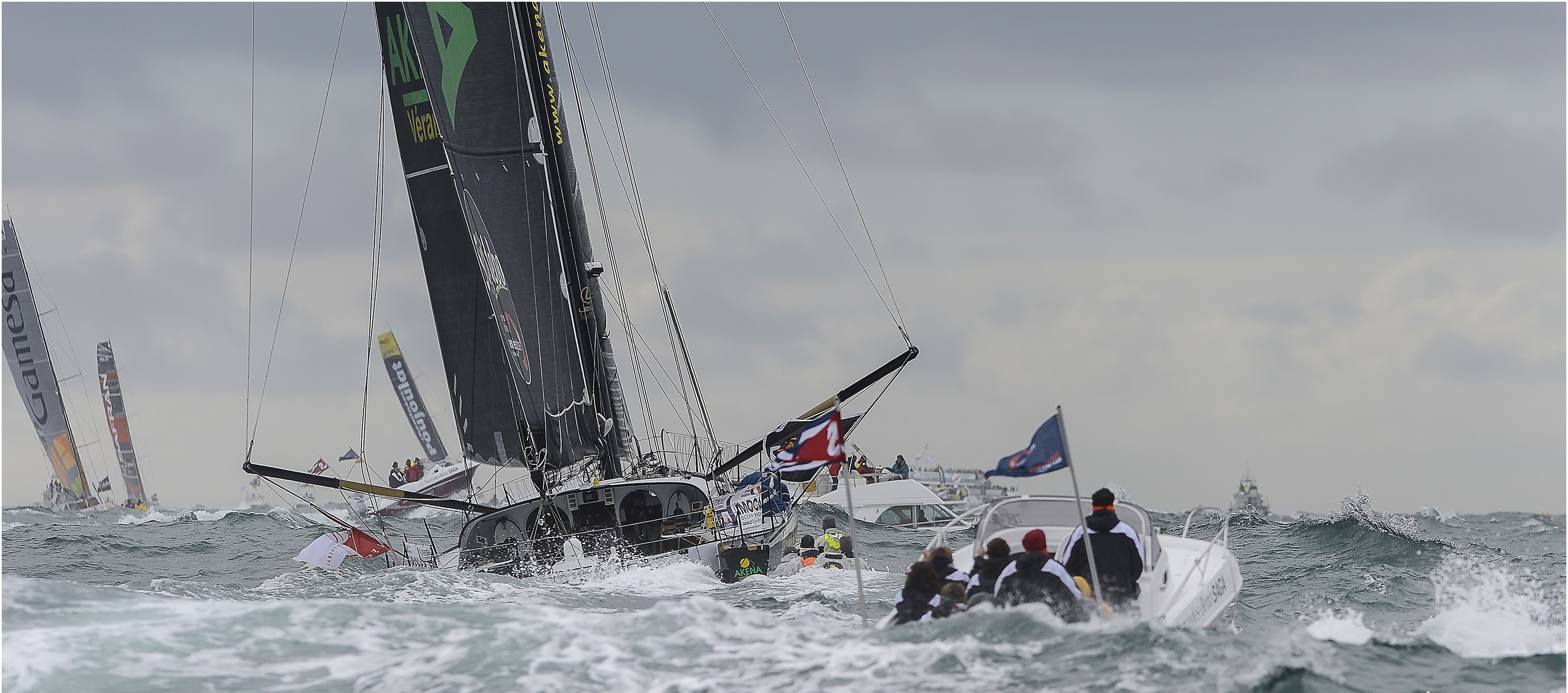 0847-Vendée 2012 (Départ)